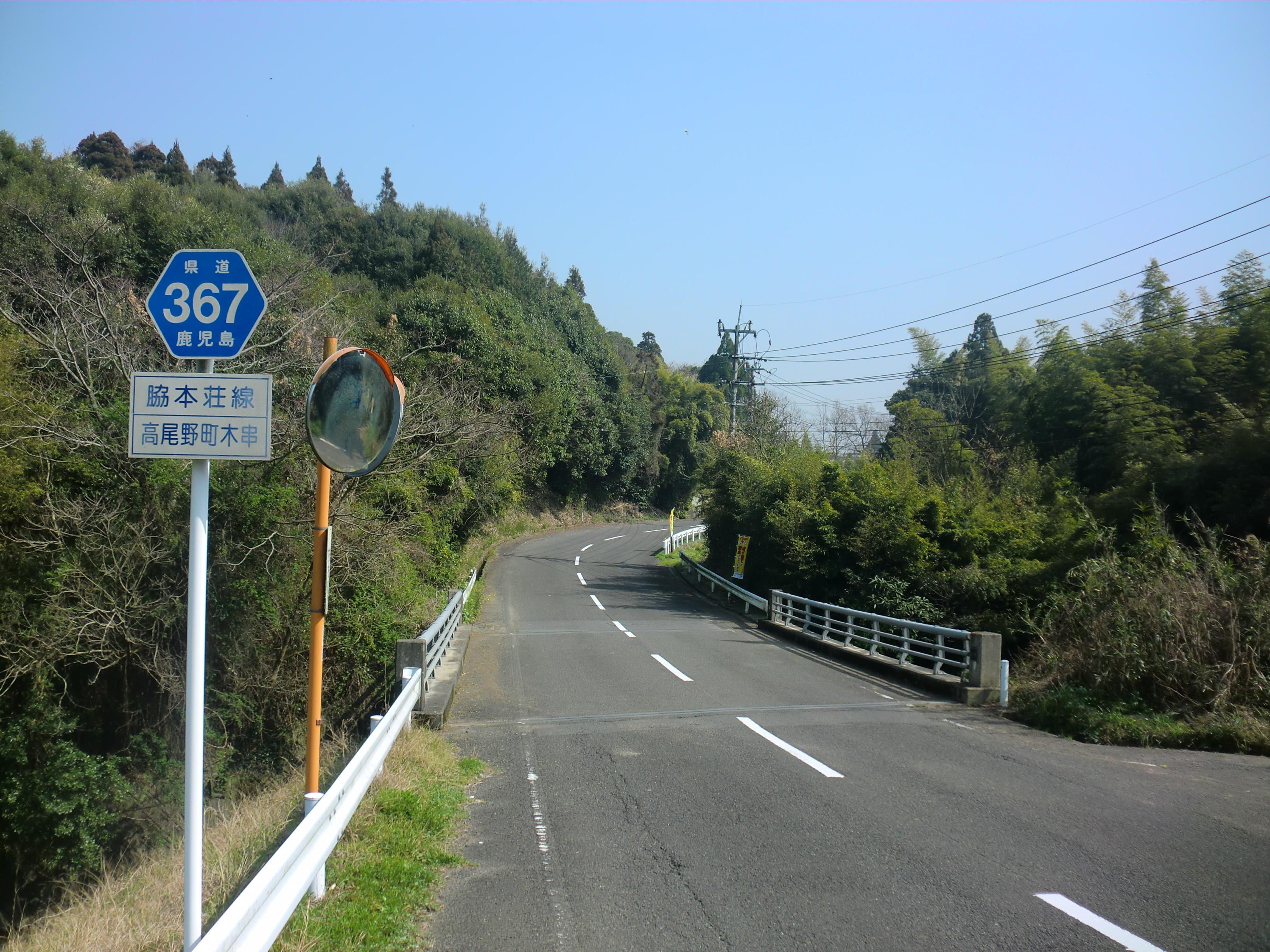 鹿児島県道308号脇本荘線。出水市で撮影。